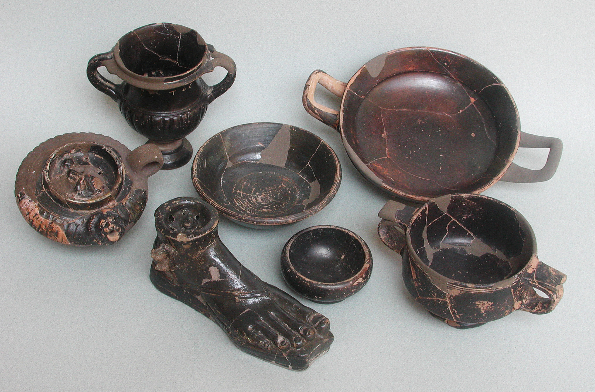 Bodegon piezas del Puntal